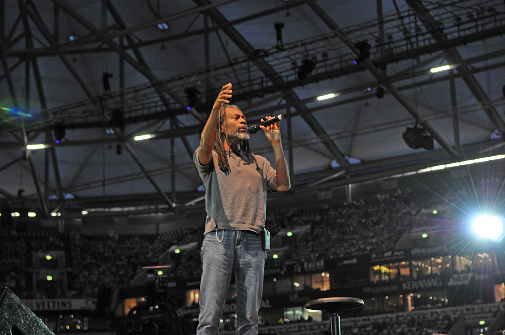 Bobby McFerrin beim Abschlusskonzert von „!SING - DAY OF SONG“ in der Veltins-Arena in Gelsenkirchen